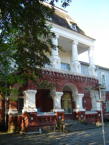 Особняк Мальцова